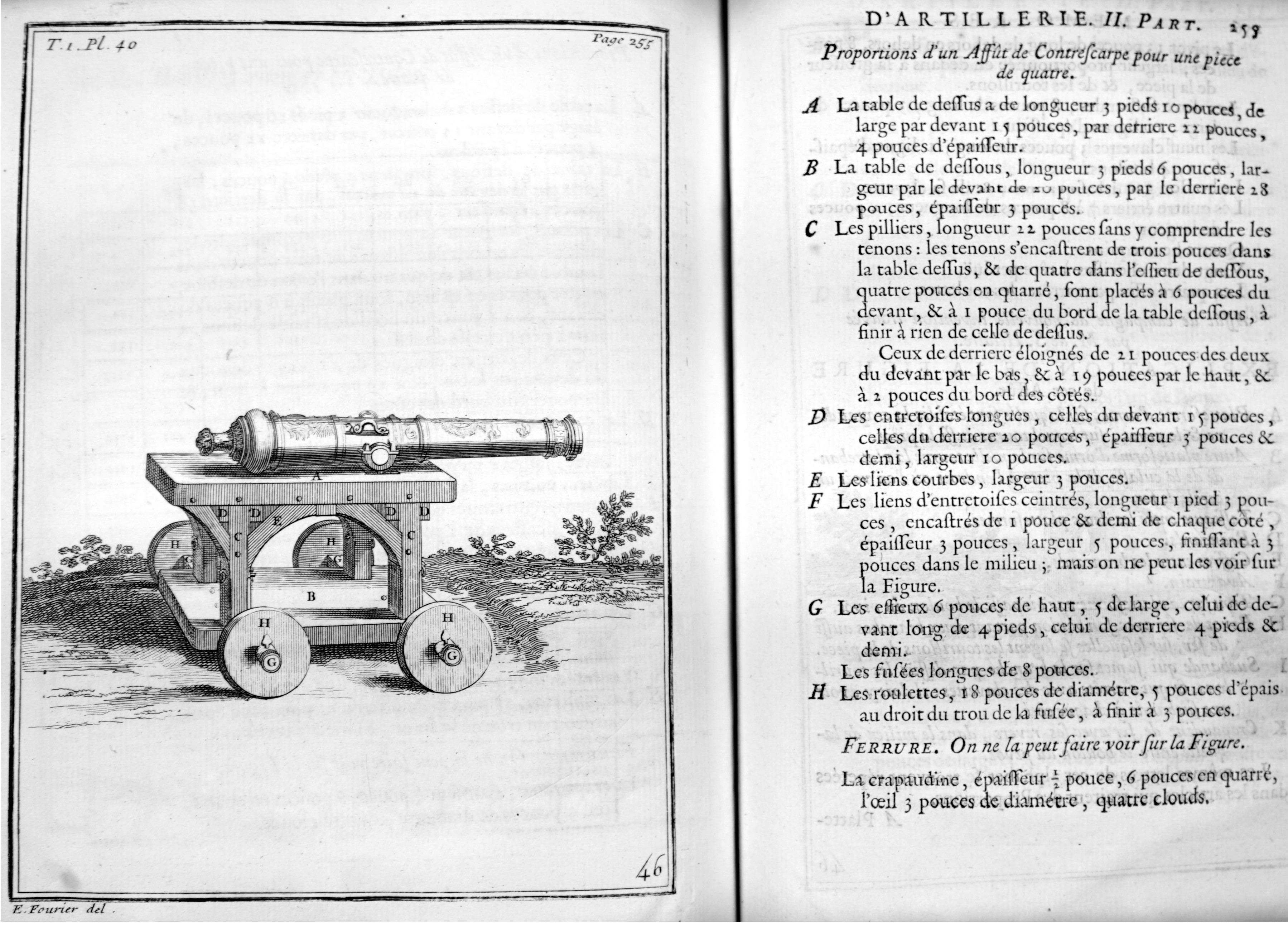 Mémoires d'artillerie, recueillis par M. Surirey de Saint Remy, exemplaire de la B.M. de Reims, troisième édition.